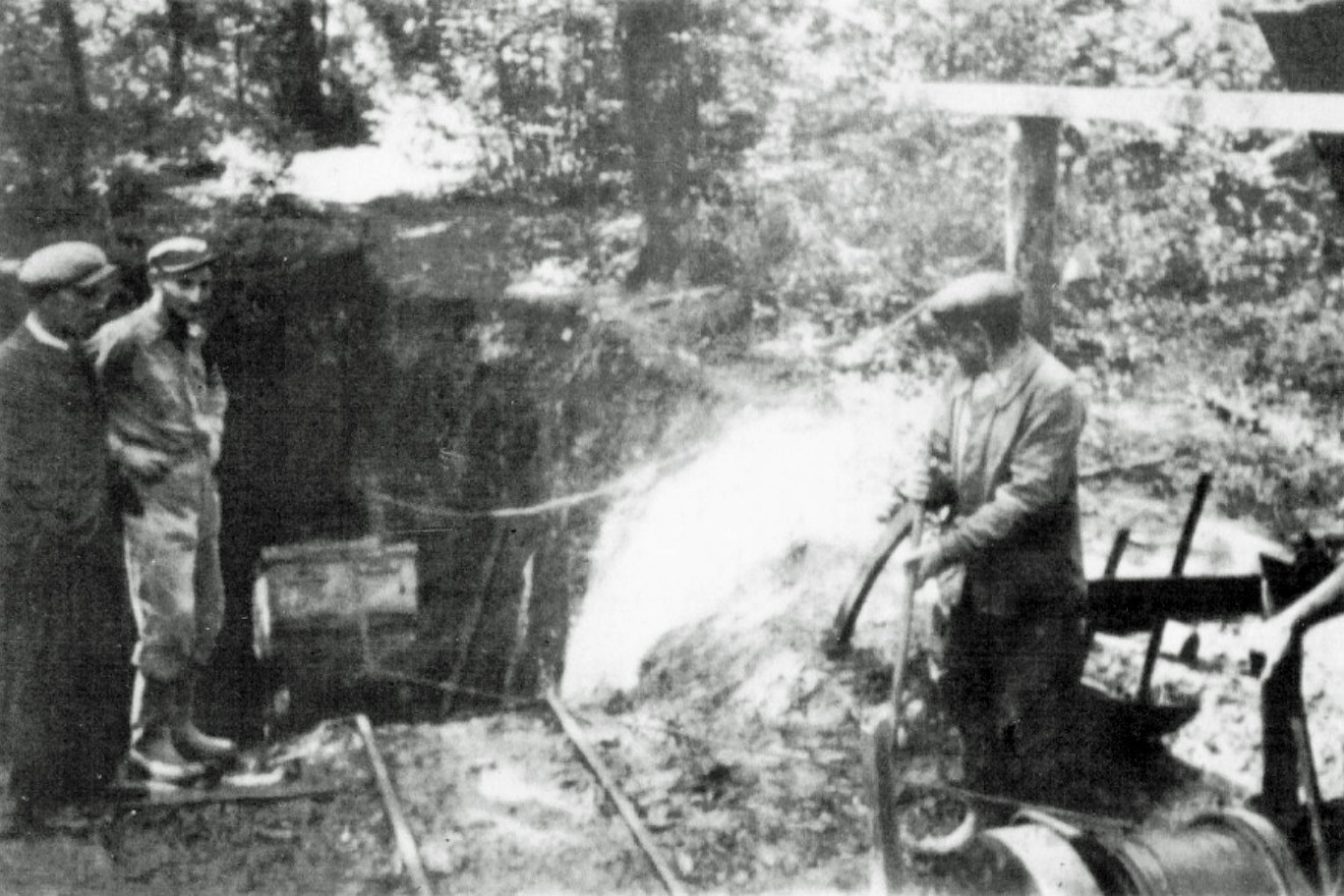 L'entrée du fonçage de l'Est dans le bois de l'Étançon. Les berline sont remontées par un treuil électrique.